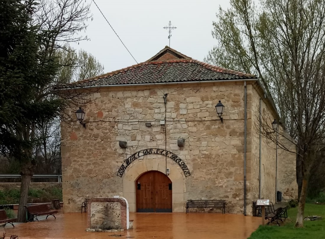 Ermita de pequeño tamaño en un pueblo de Segovia, Mozoncillo